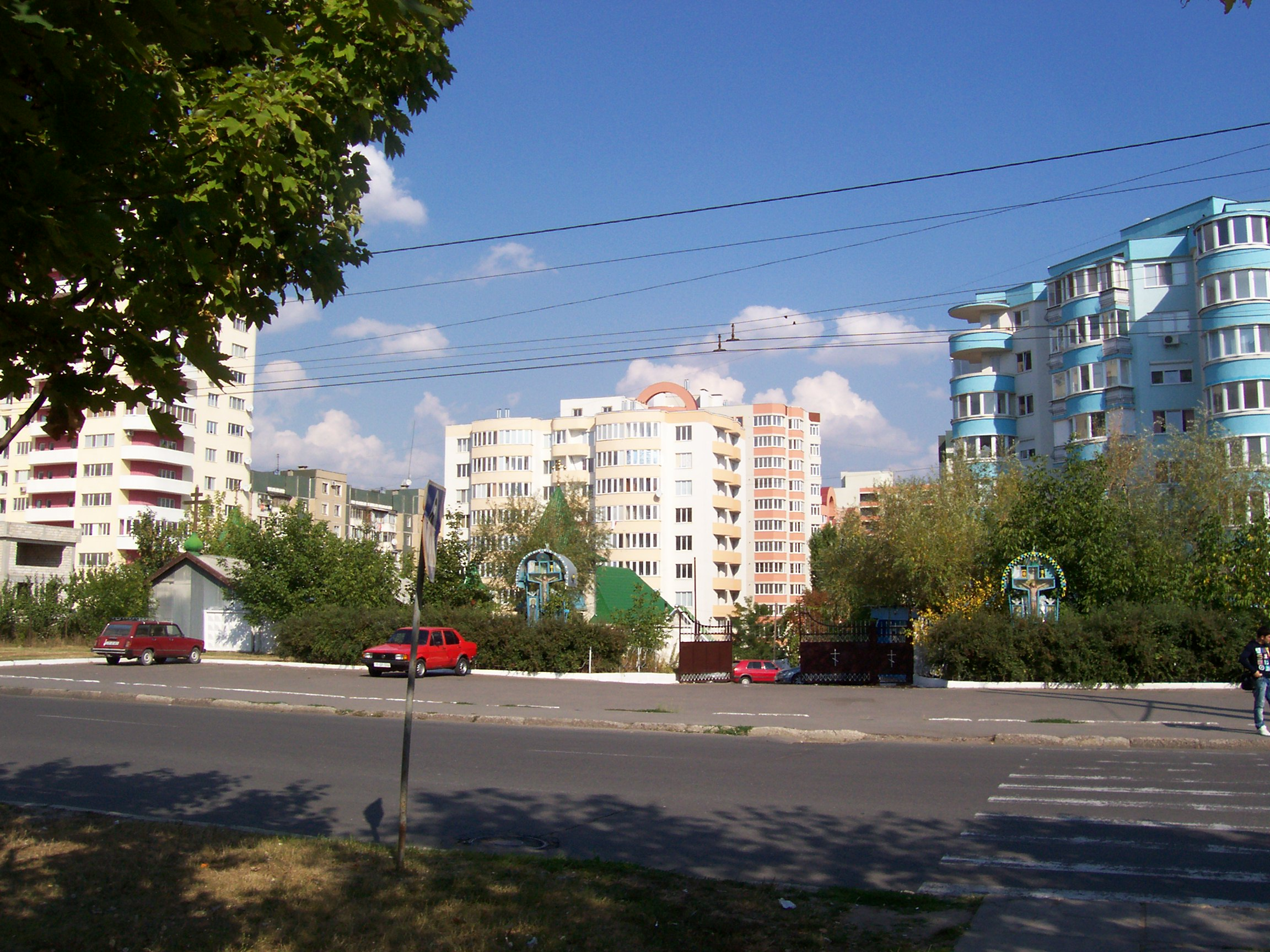 Современная застройка проспекта Мирча чел Бэтрын